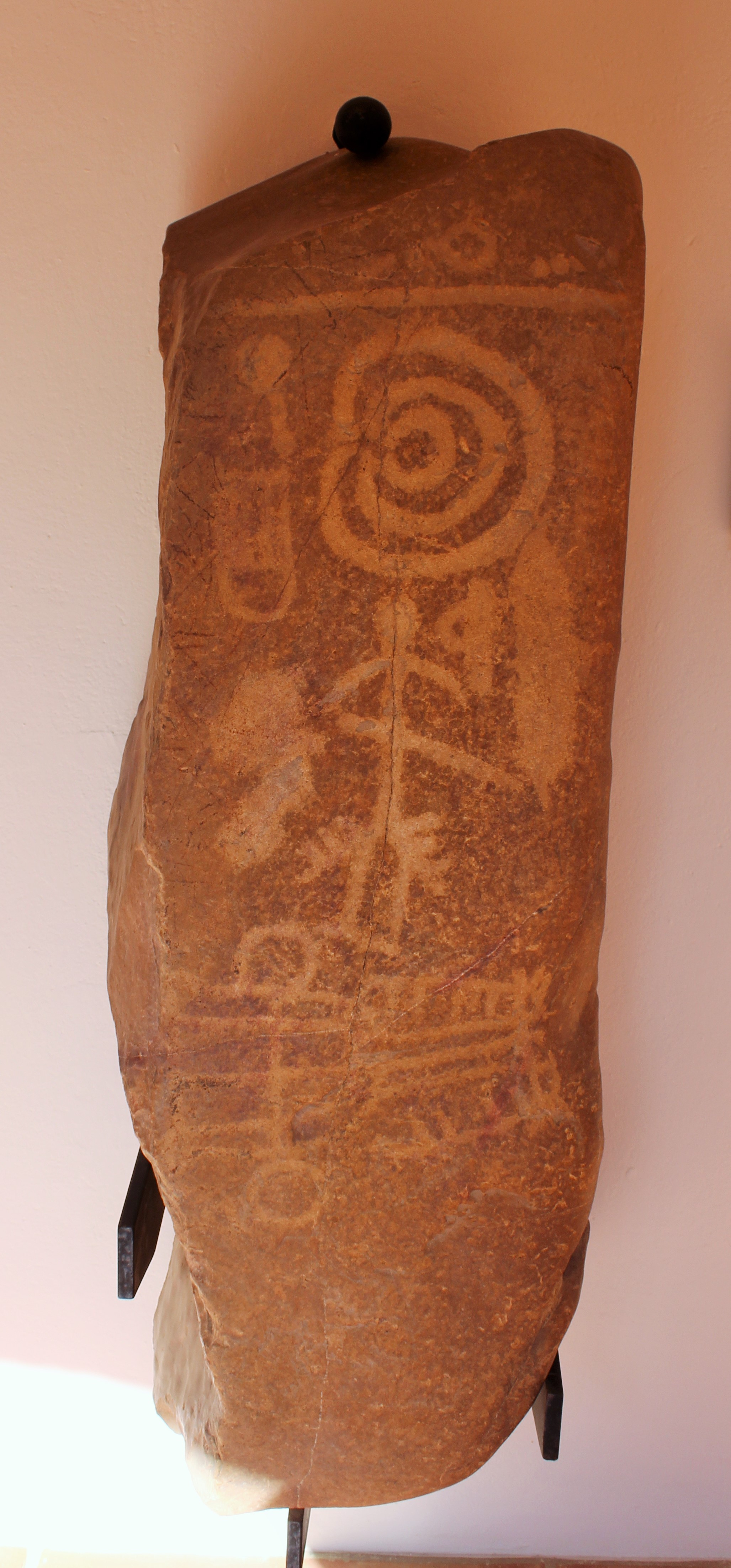 Estela de guerrero. Siglo VII-VI a.C Los Llanos, Zarza Capilla, Badajoz